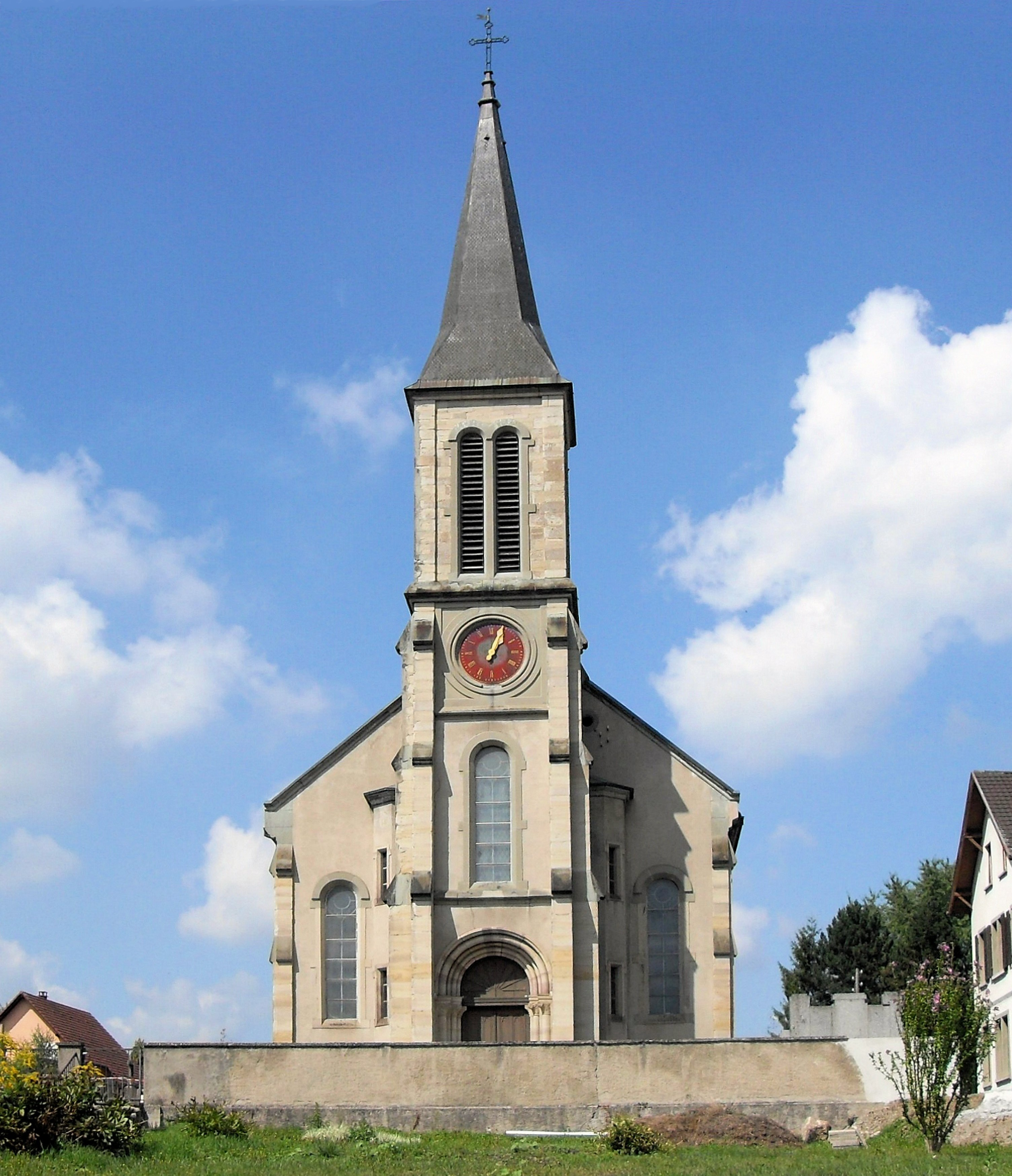 L'eglise Saint-Pierre et Saint-Paul à Hagenthal-le-Bas